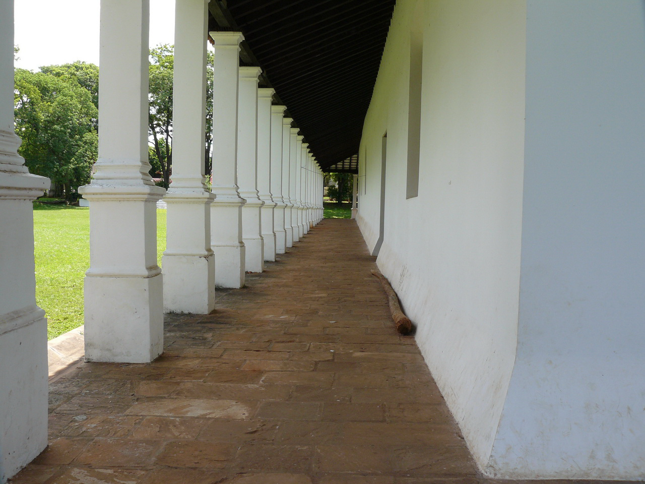 Fotos tomadas por mí, a inicios del año 2008 costado de la iglesia de yaguaron